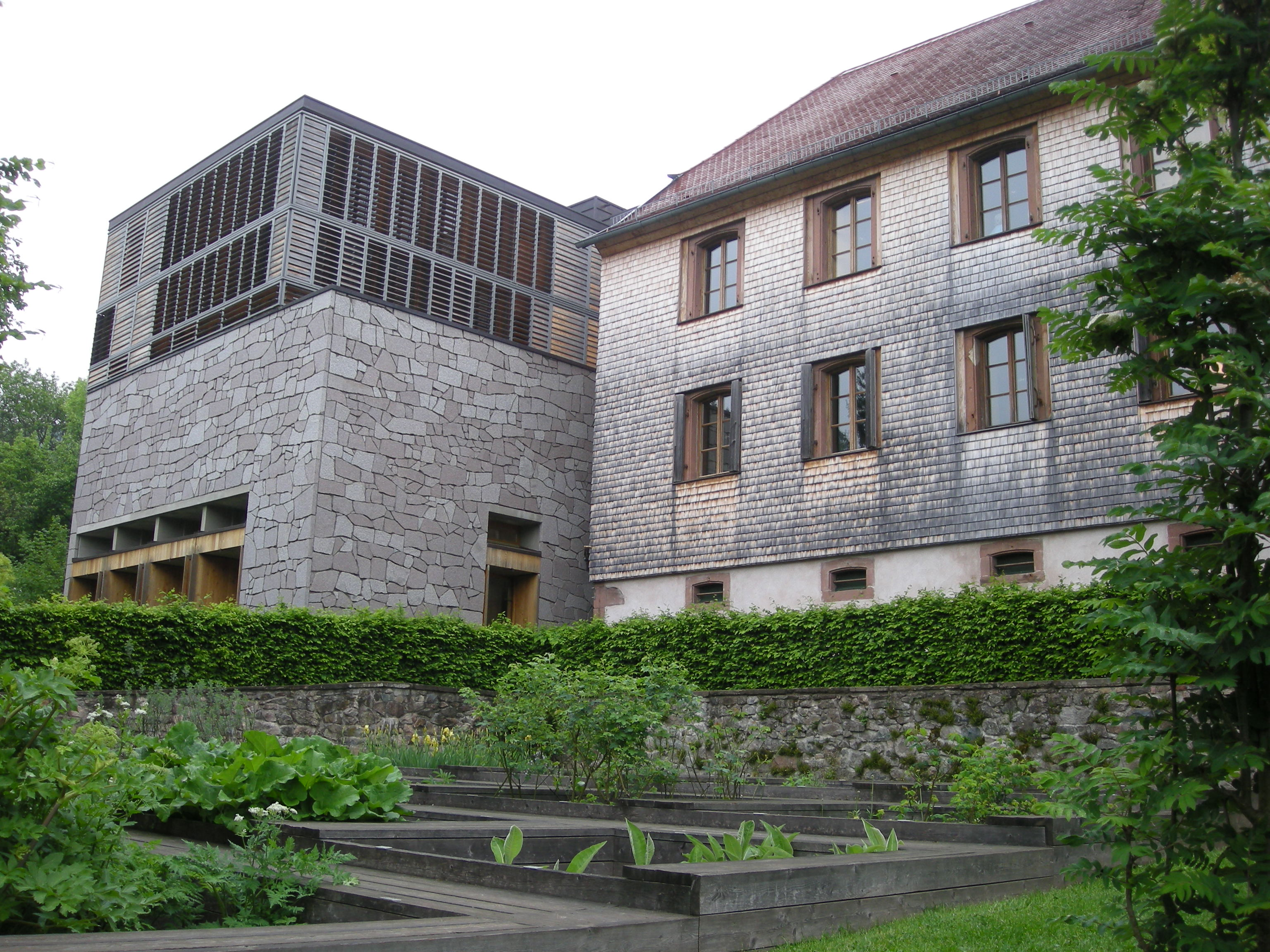 Intégration des nouveaux bâtiments au Musée Jean-Frédéric Oberlin à Waldersbach (Bas-Rhin). Vue depuis les jardins.